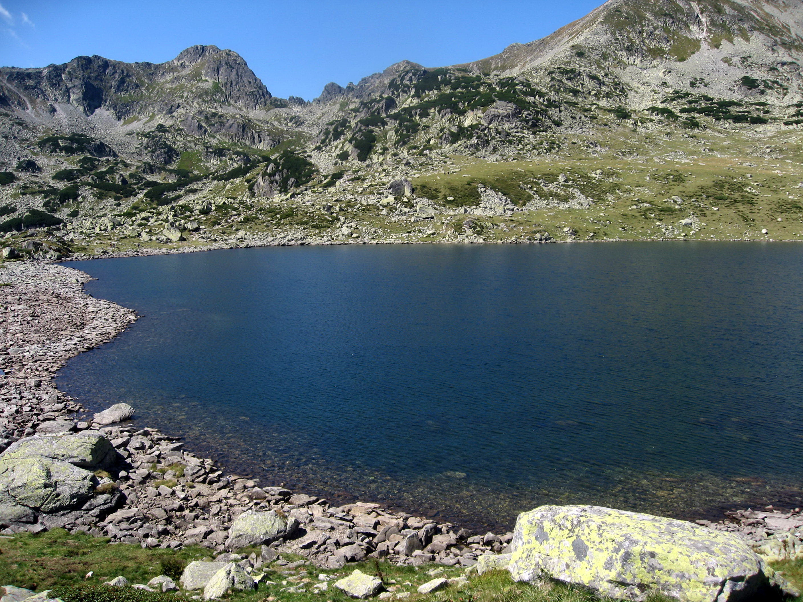 Jezero Bucura